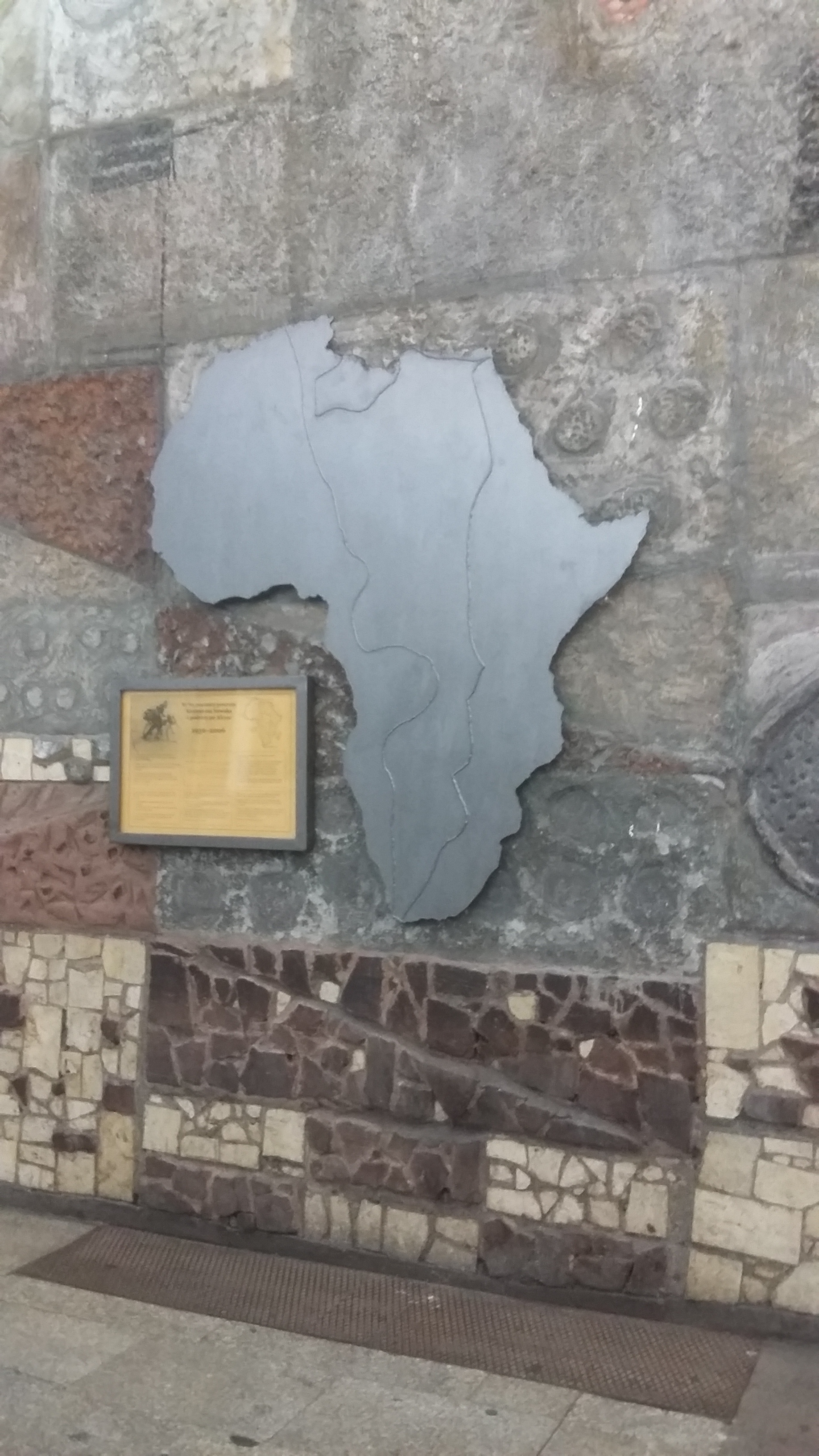 Tablica poświecona Kazimierzowi Nowakowi na Dworcu Główny w Poznaniu (stary budynek)